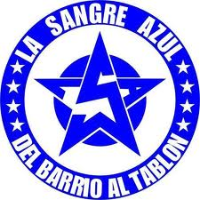 logo de la barra brava La Sangre Azul